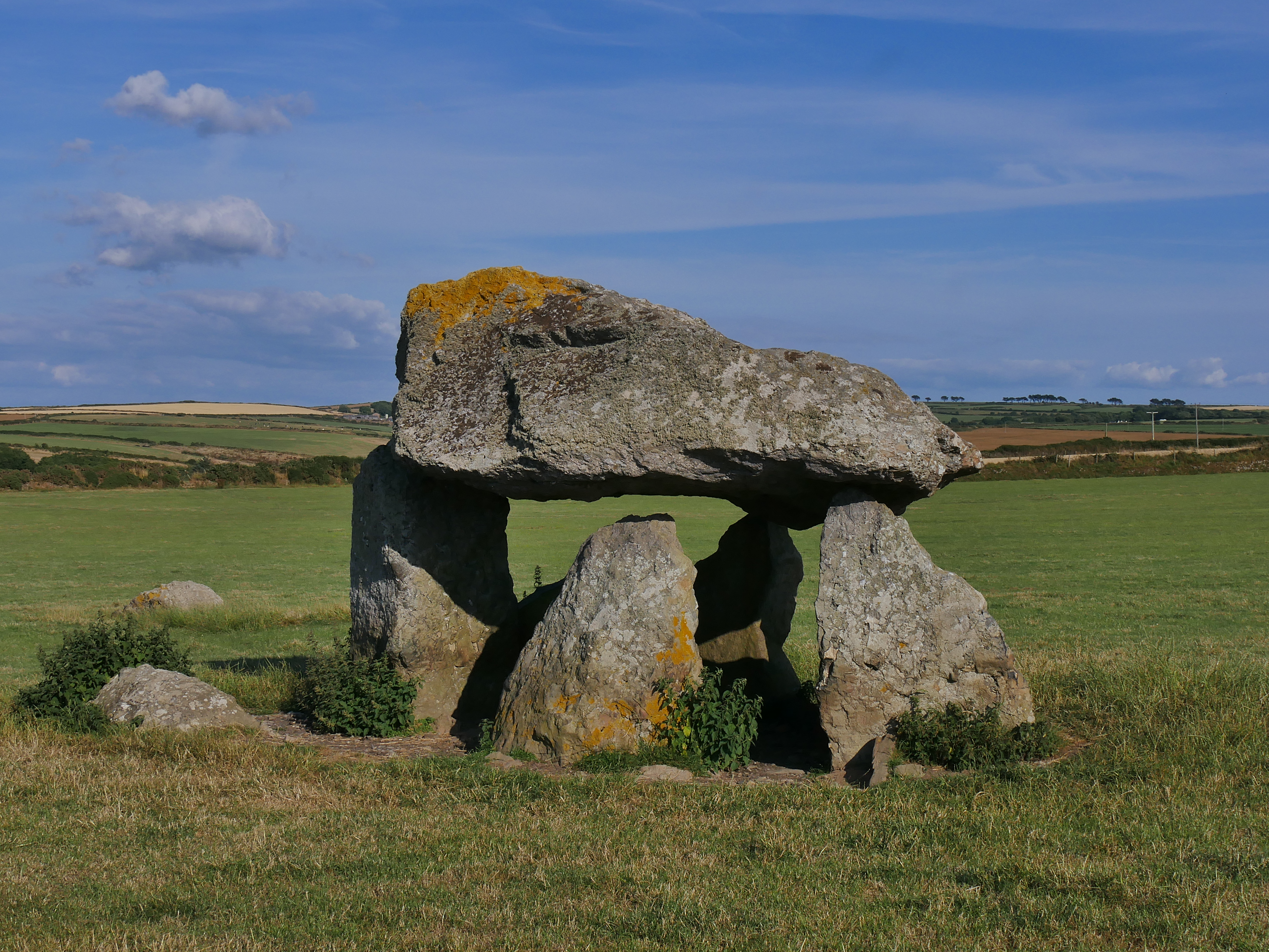 Carreg Samson - a neolitic dolmen in southwest Wales.